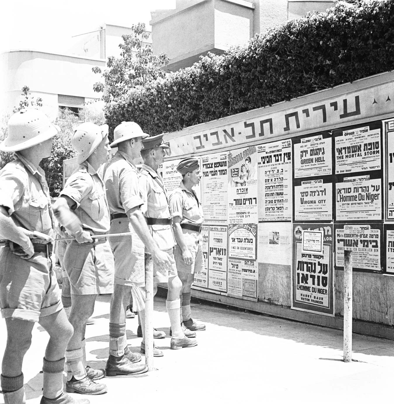 אוסף צילומים של הצלם זולטן קלוגר טווח מספרי התשלילים 15265 - 15338: חיילים יהודים מדרום-אפריקה בתל-אביב